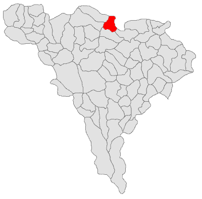 Categorie:Hărţi ale judeţului Alba